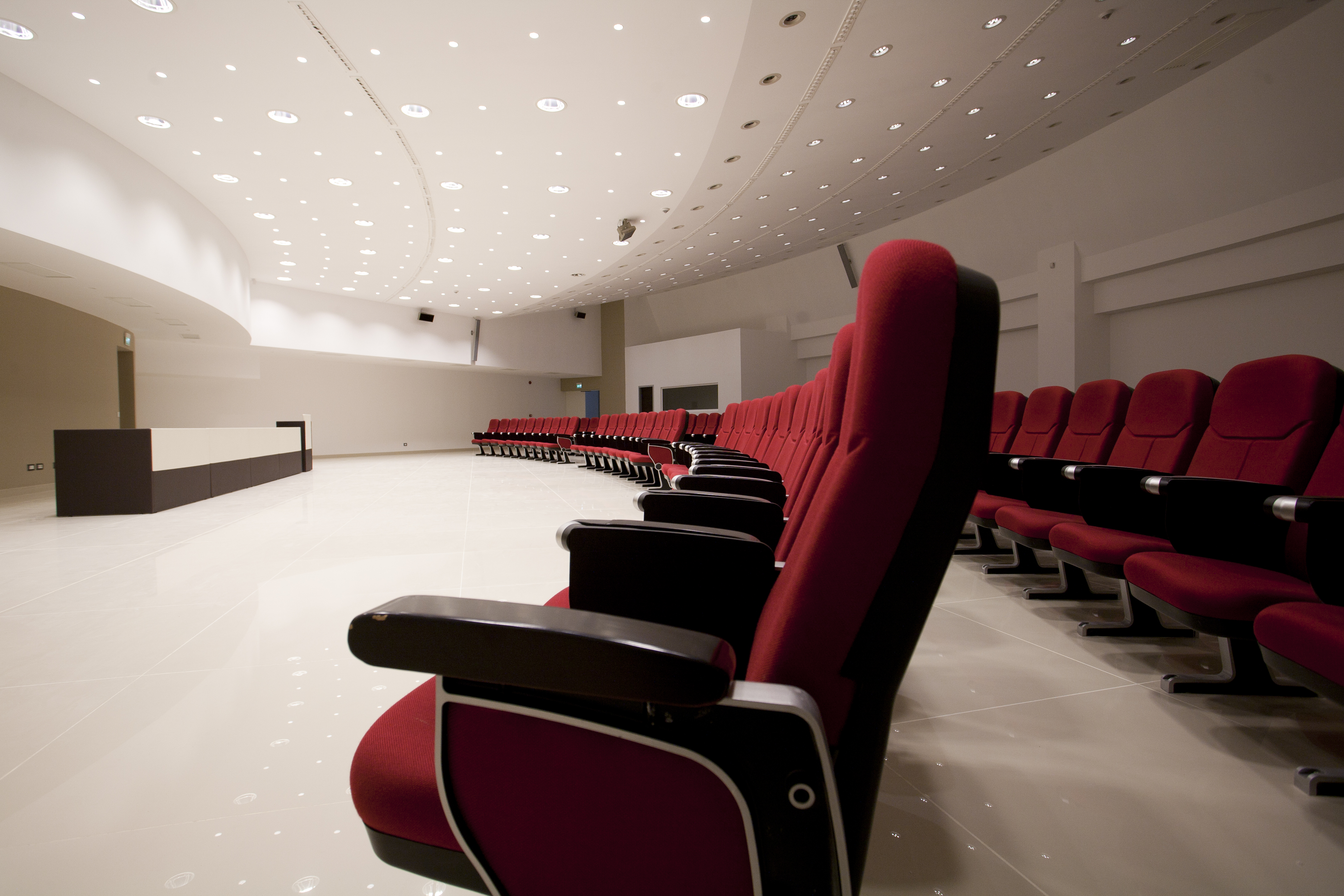 Սեմինարների դահլիճ